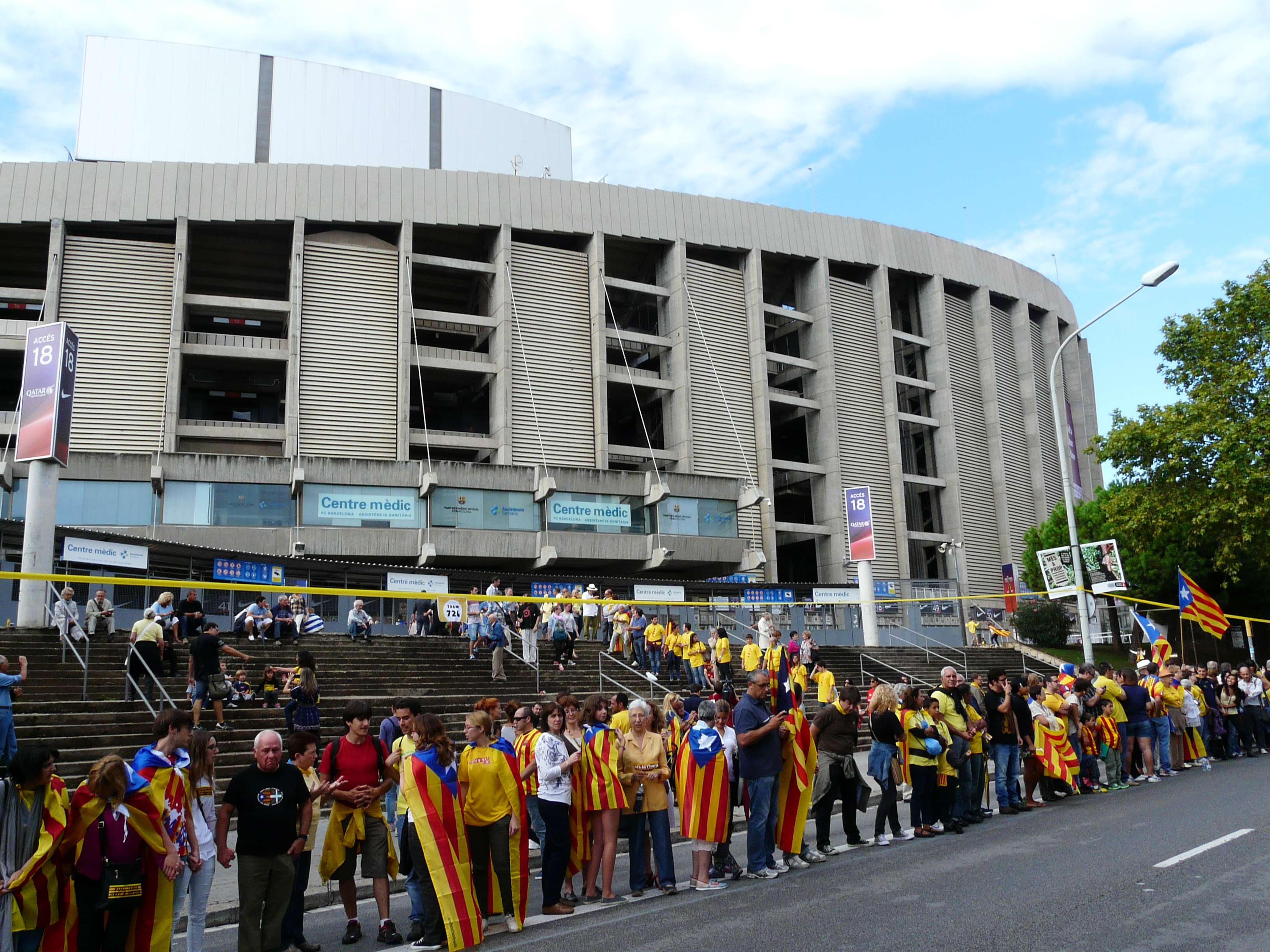 Via Catalana per la Independència (abans de la Via, durant la Via o després de la Via, a Barcelona i el Baix Llobregat.